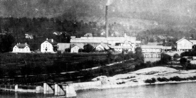 Zementfabrik und Kraftwerk «Rüchlig» der Jura-Cement-Fabriken Aarau im Herbst 1906. Links im Vordergrund ist das in der 1. Ausbauetappe errichtete Wehr zur Verbesserung des Wassereinlaufes in den Oberwasserkanal sichtbar, in der Mitte zwischen den beiden Gebäudekomplexen der Zementfabrik das Kraftwerkgebäude.